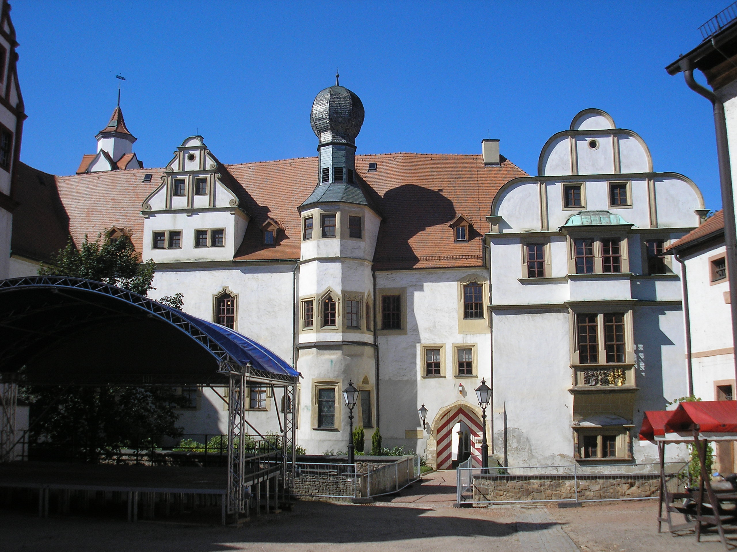 Das Schloss Hinterglauchau in Glauchau (Sachsen).